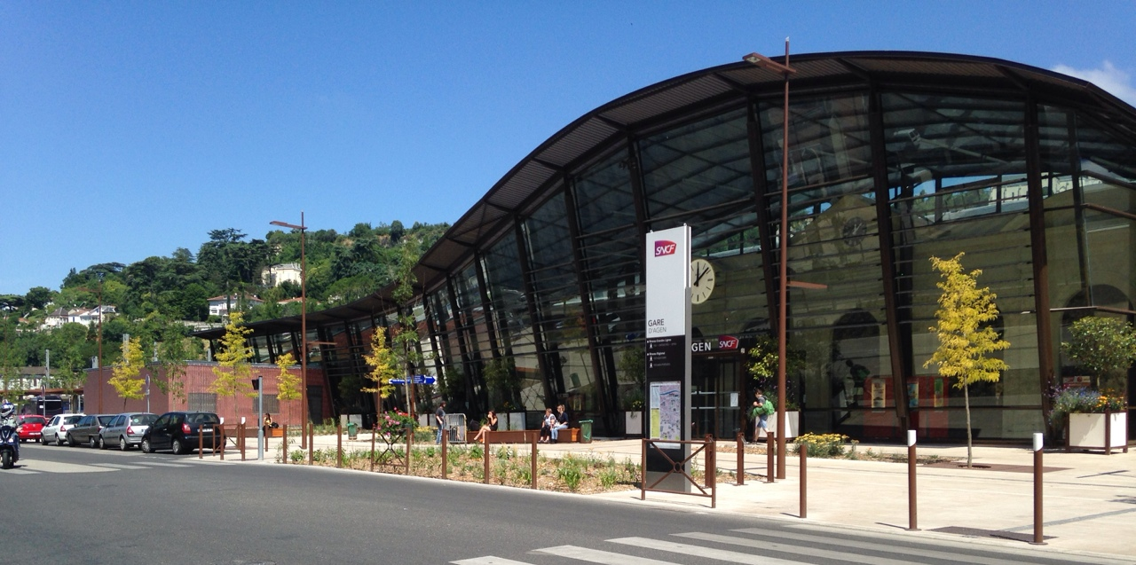 Image de la gare SNCF d'Agen rénovée en 2014, la verrière courbée et l'horloge devant la façade d'origine, et l'esplanade pavée plantée d'arbres.